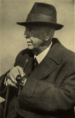 Jiří Janda (1865 - 1938), Český středoškolský profesor a ornitolog.